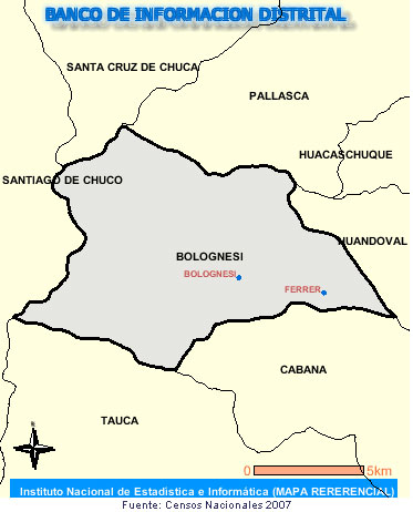 El distrito peruano de Bolognesi es uno de los 11 que conforman la provincia de Pallasca, ubicada en el Departamento de Ancash, perteneciente a la Región Ancash, Perú. Limita al norte con el distrito de Pallasca, al este con el distrito de Huandoval, al sur con el distrito de Cabana y el distrito de Tauca, al oeste con la Región La Libertad. Fue anexo del Distrito de Cabana conocido como Mormurullo, siendo declarado como distrito, el 15 de julio de 1936. El distrito de Bolognesi está situado en el extremo oeste de la provincia de Pallasca, Región Ancash, a 2, 880 m .s.n.m. Geográficamente está a 08º20'51" de latitud sur y a 78º02'48" de longitud oeste.